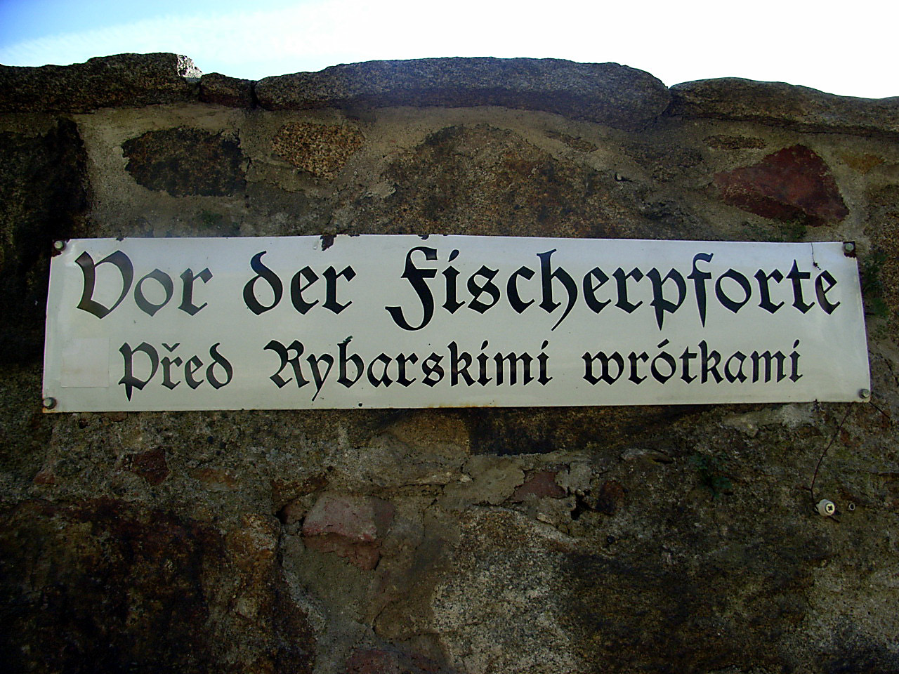 Zweisprachiges Straßenschild in der Bautzener Altstadt. Hornjoserbsce: Dwurěčna dróhowa taflička w Budyskim starym měsće.